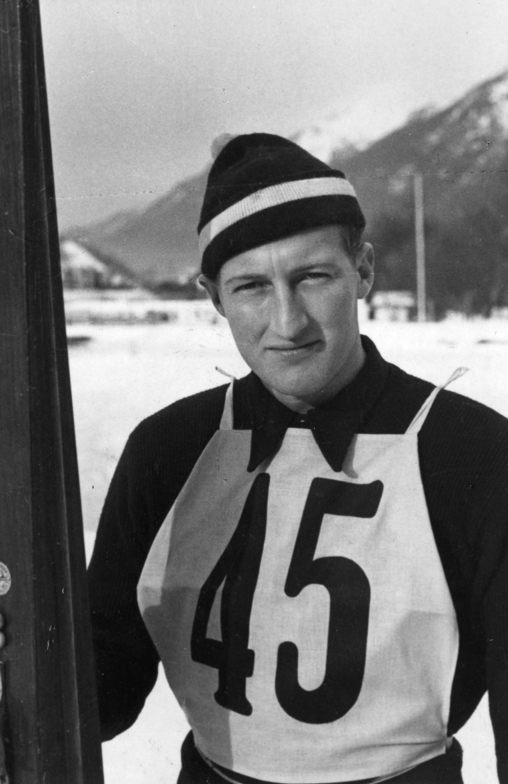 Norwegian ski jumper Reidar Andersen at the Olympics in Garmisch-Partenkirchen